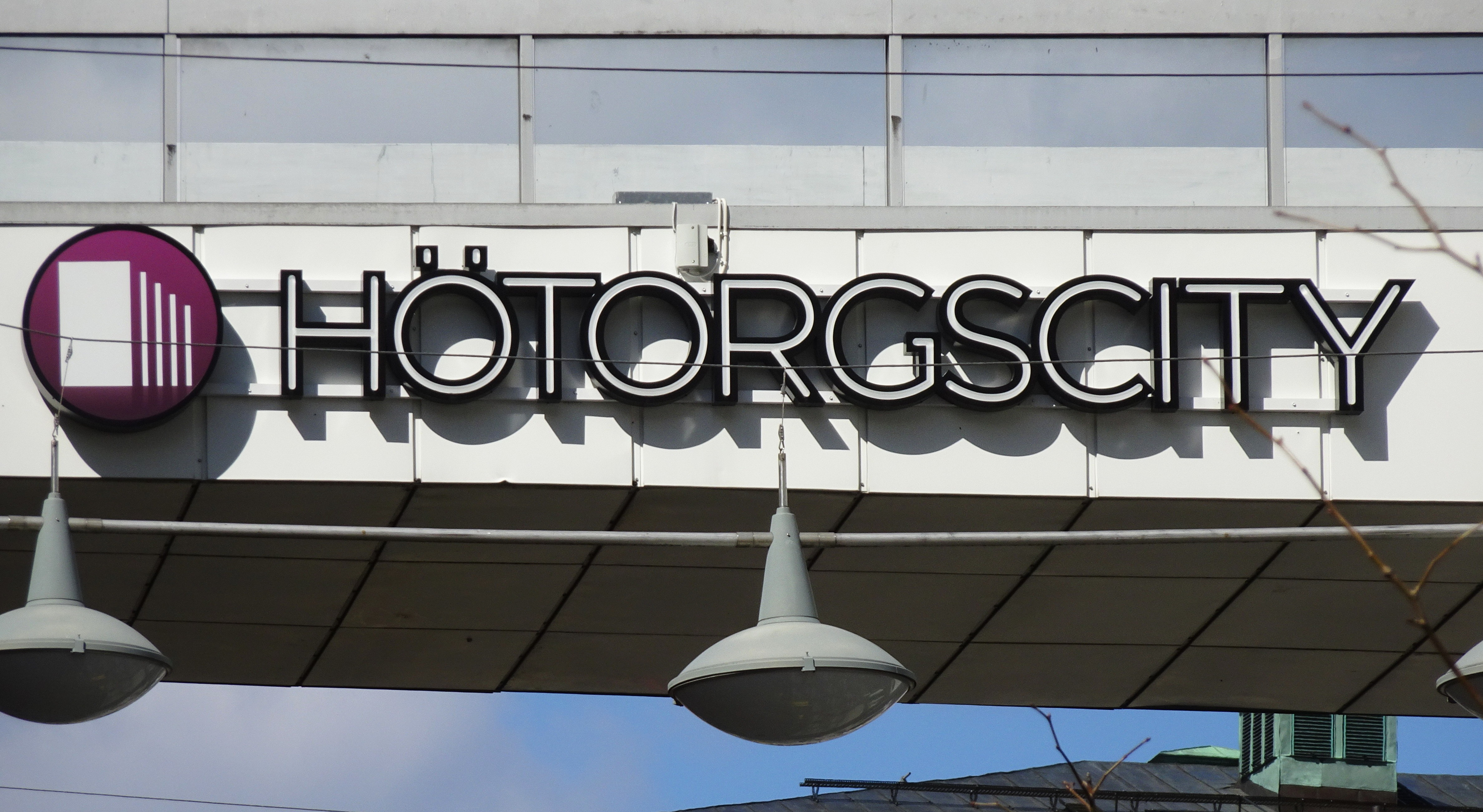 Hötorgscity, skylt över Sergelgången